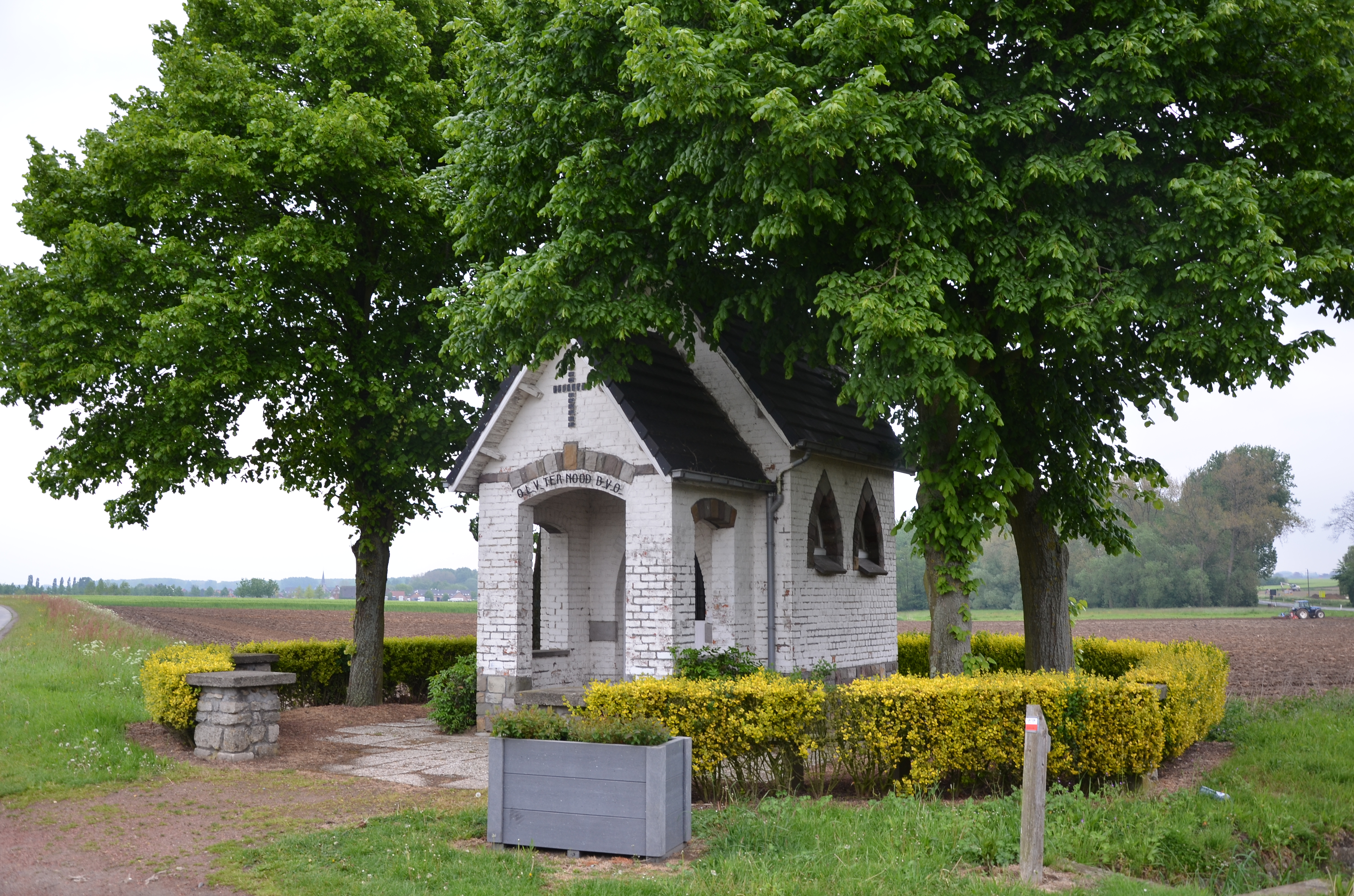 OLV ter Nood, Brussegem